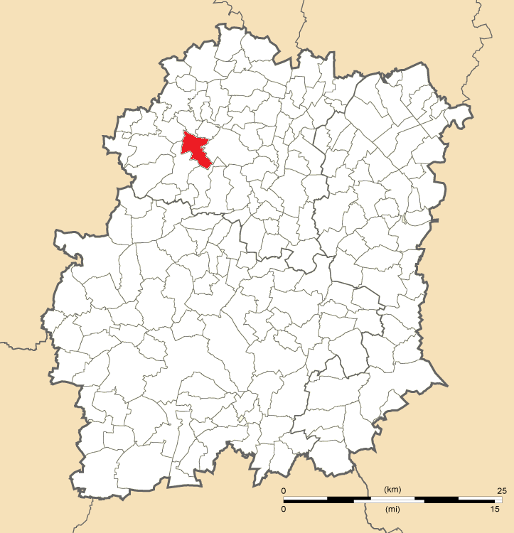 Carte de position de Janvry en Essonne (91)